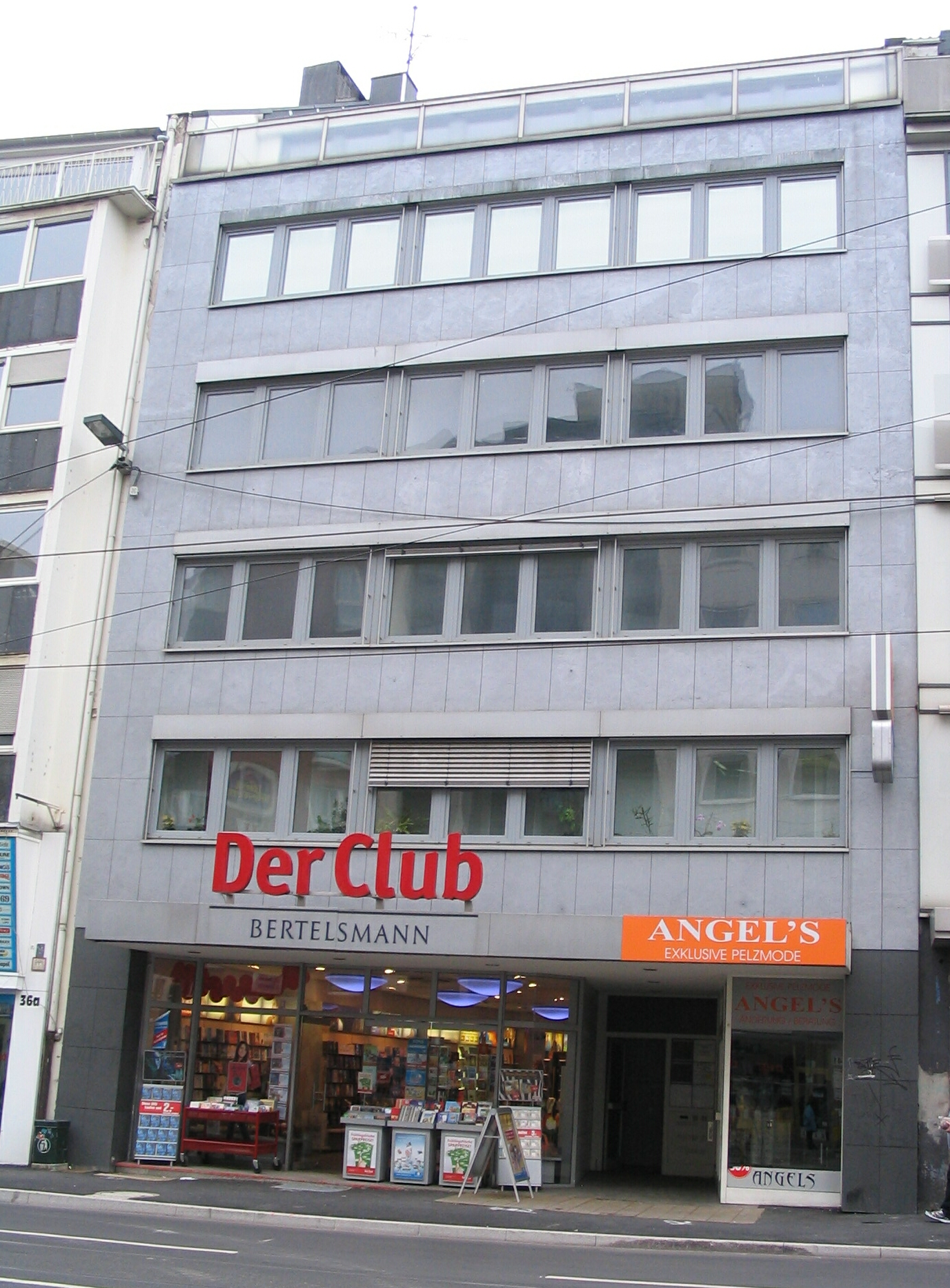 Am Wehrhahn 38, Düsseldorf-Pempelfort (Stadtmitte) Bertelsmann Der Club Angel's, Exclusive Pelzmode, Änderung/Beratung